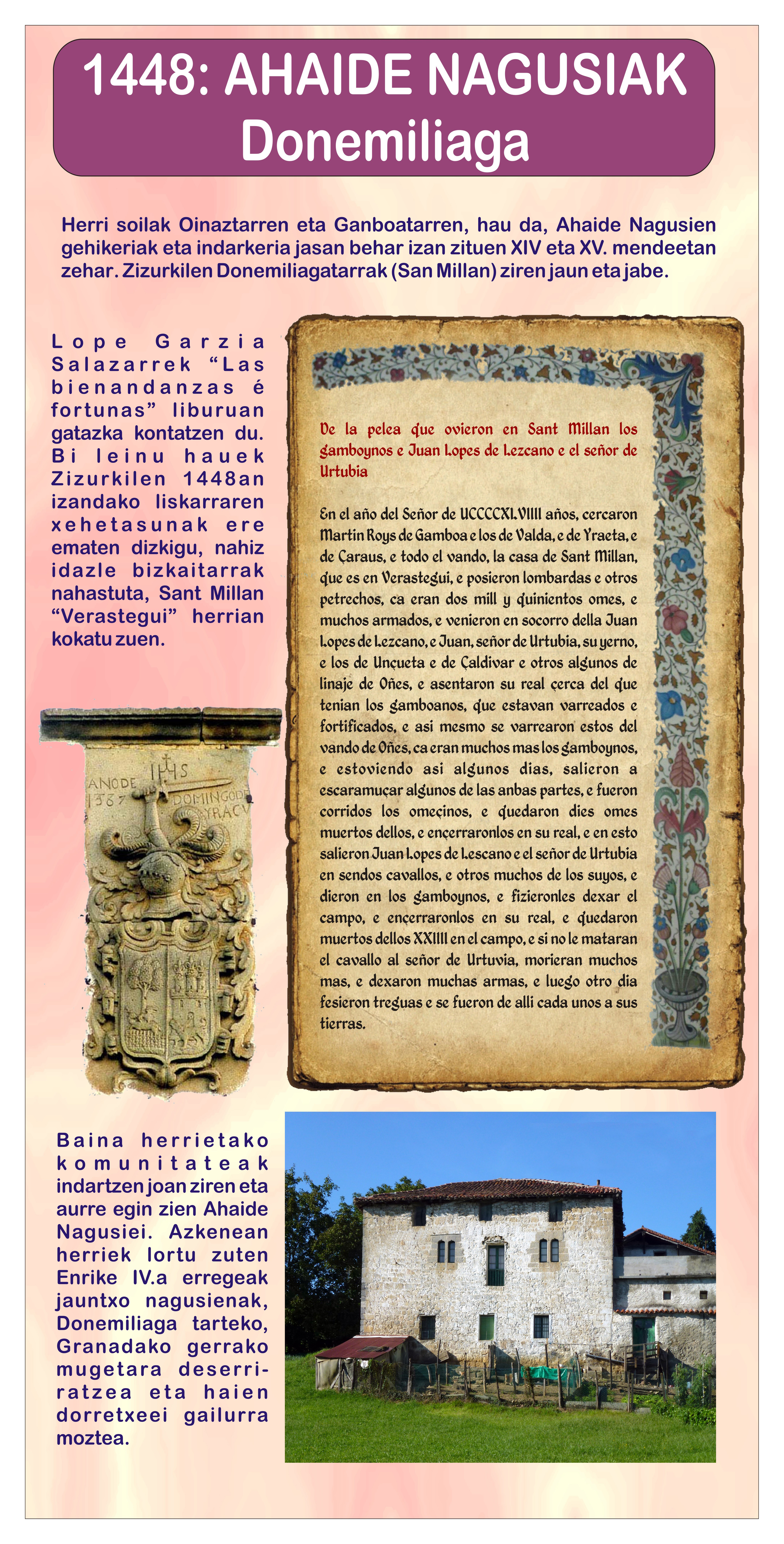 Ahaidenagusiak eta ZIzurkil